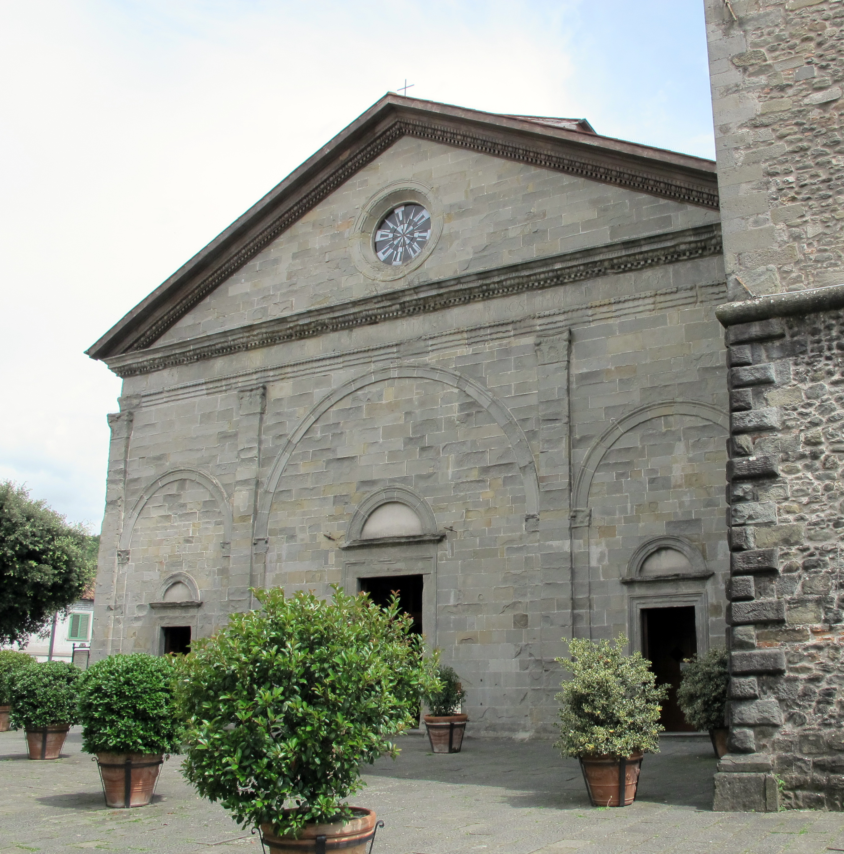 Castelnuovo di Garfagnana